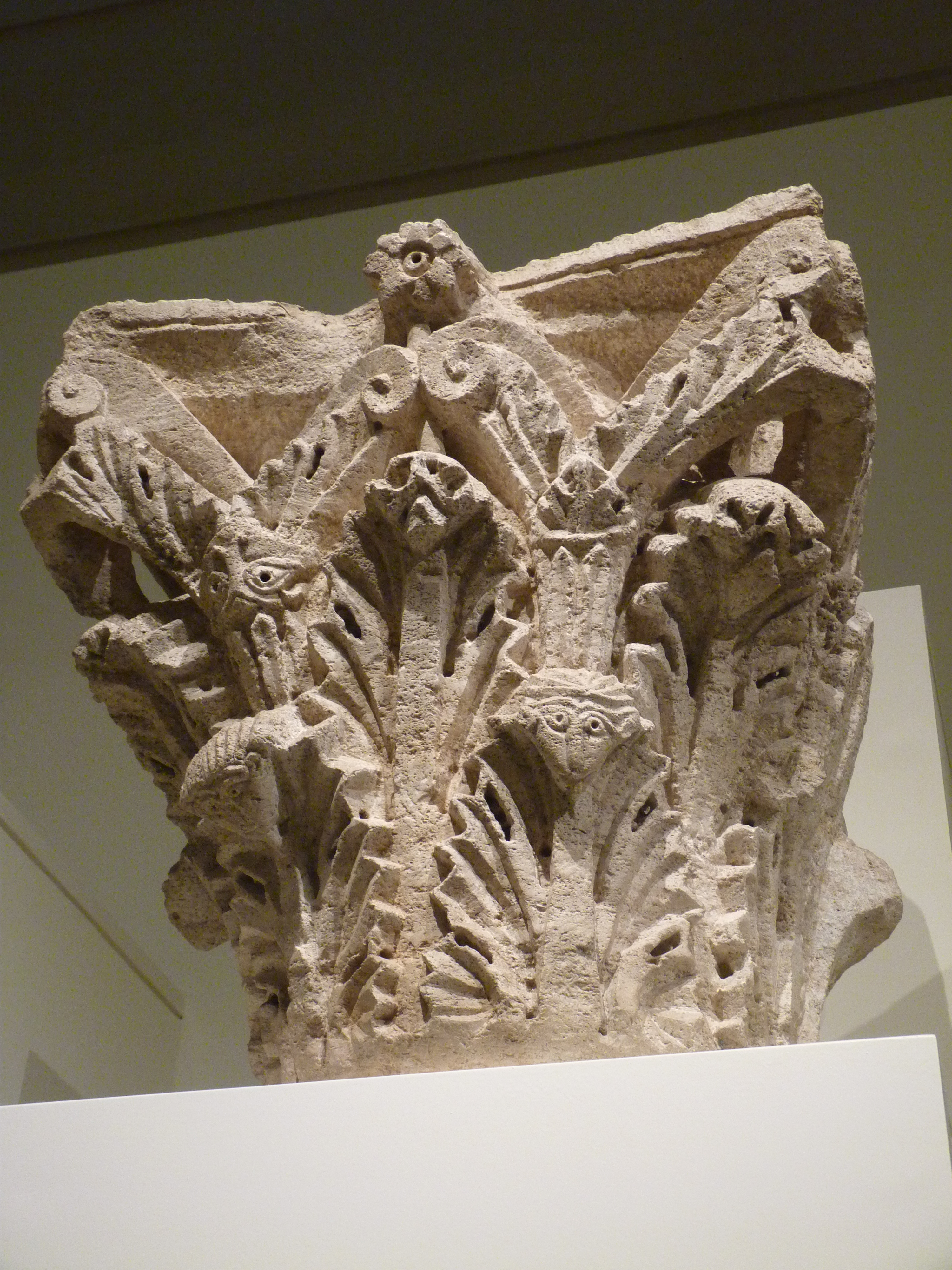 Capitell de Santa Maria de Besalú. ANÒNIM. Entre 1137 i 1167/1171